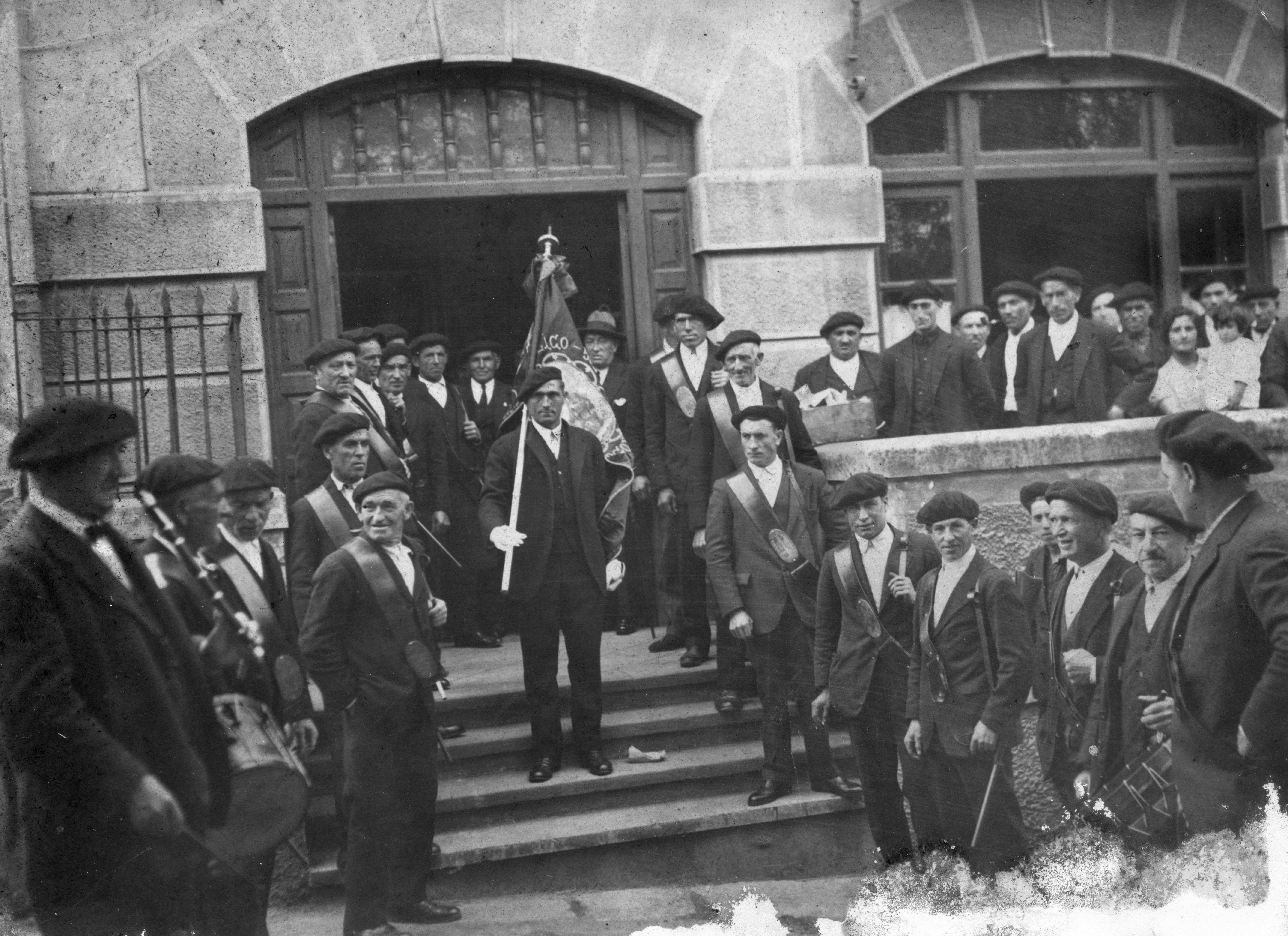 Baserritarren Sindikatu aurrean (1925), ezkerrean Martin Elola.